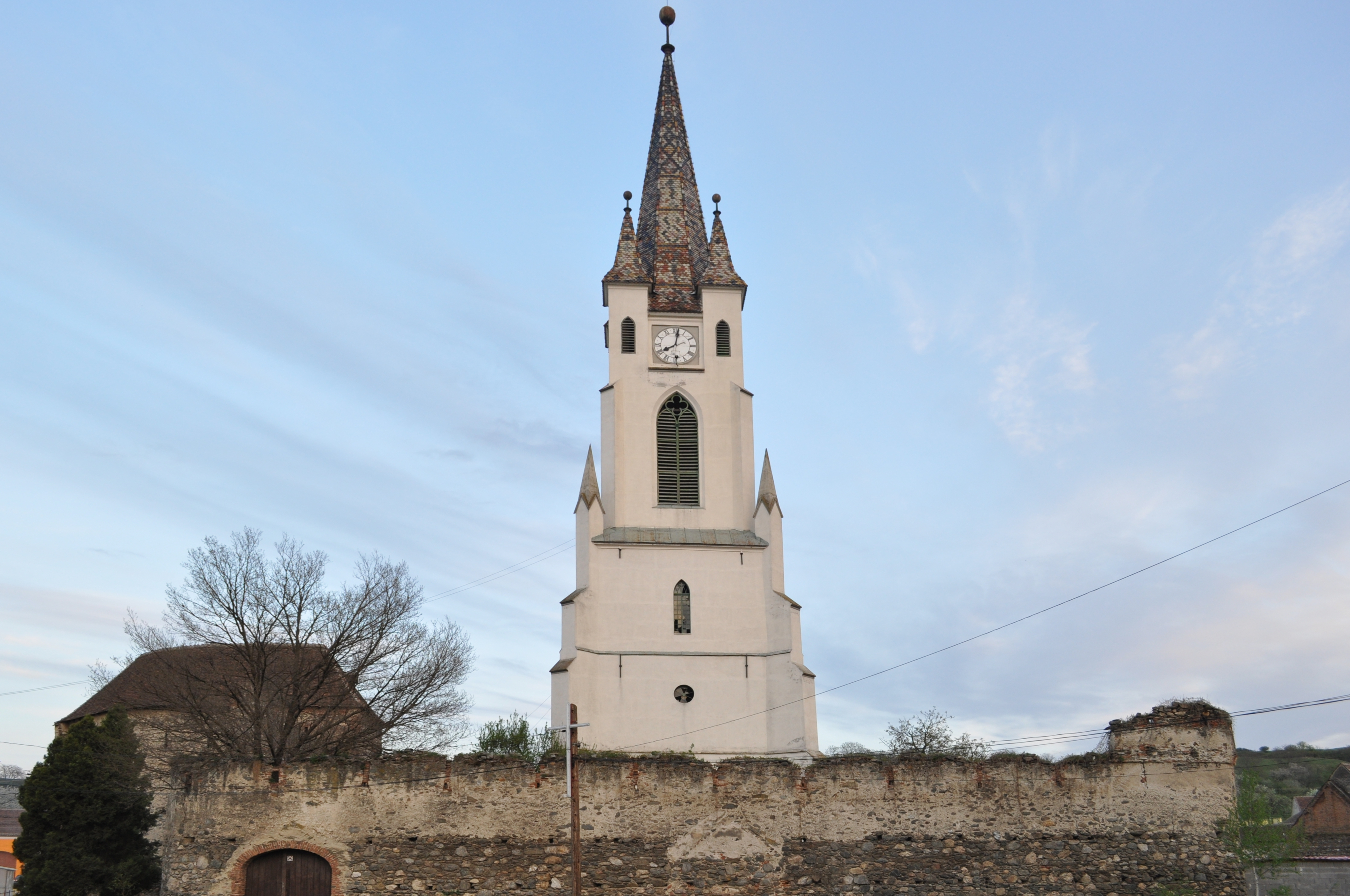 Cetatea medievală, Gârbova, județul Alba